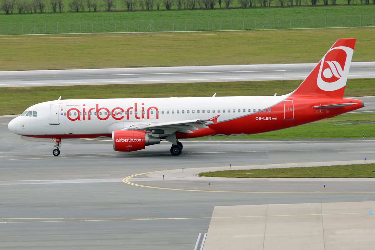 Niki, OE-LEN, Airbus A320-214